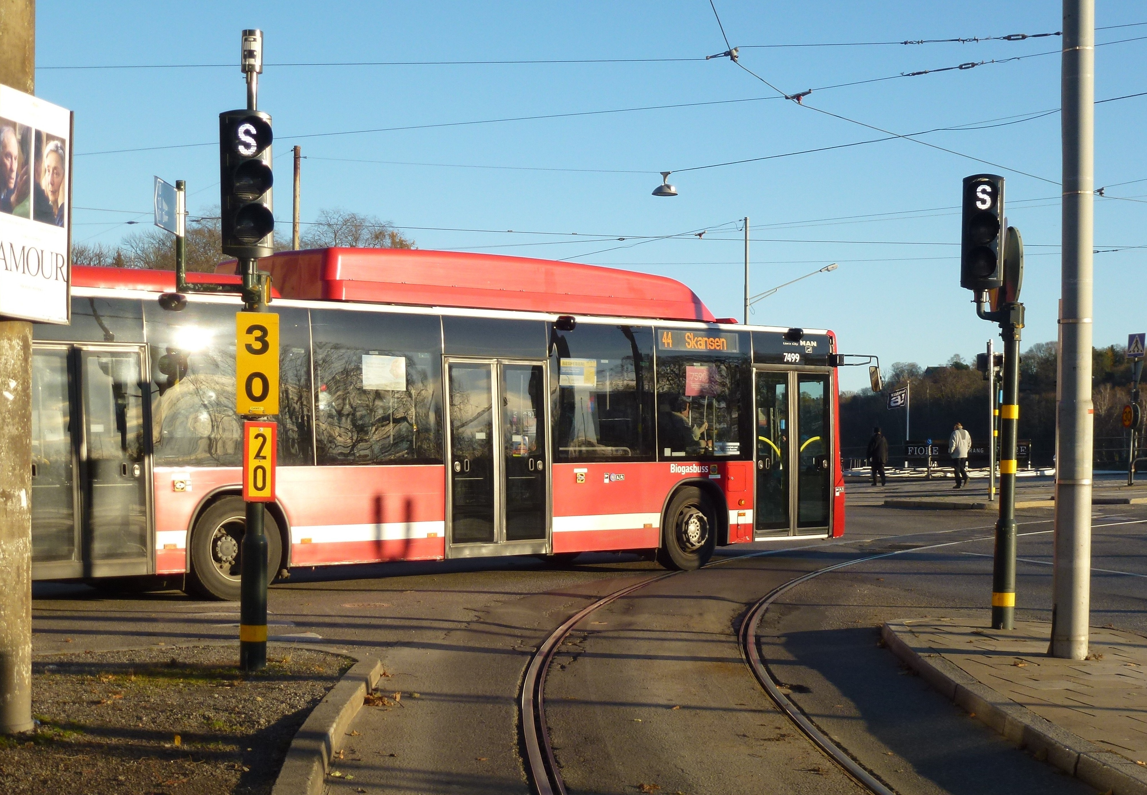 Trafiksignal för spårvagn och buss